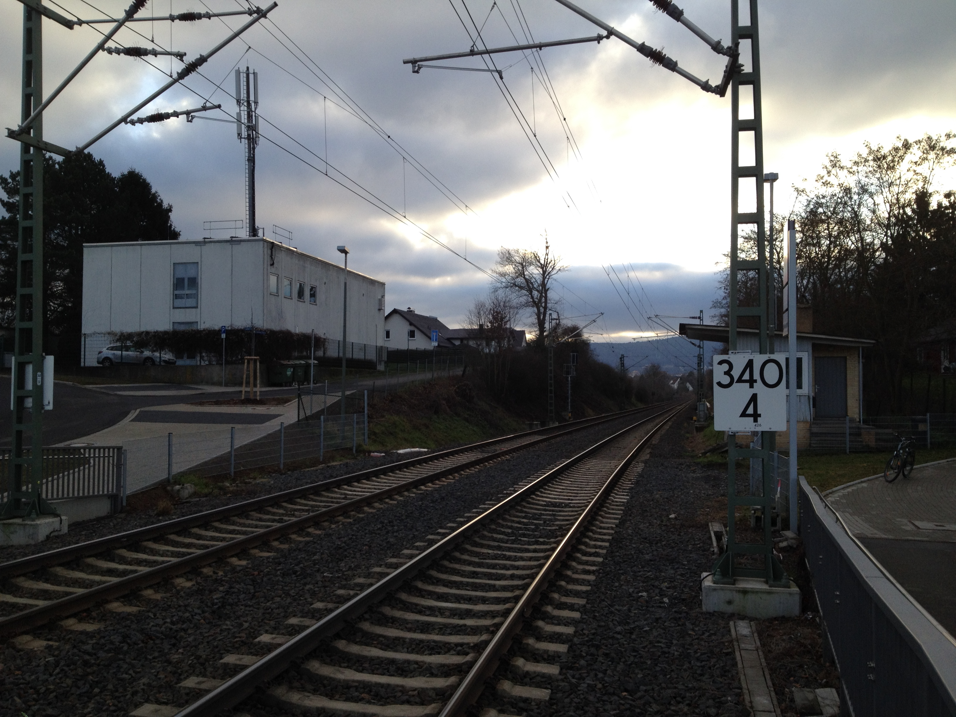 Hier befand sich bis 2012 die schranke Jungfernkopf, ein Bild von ihr